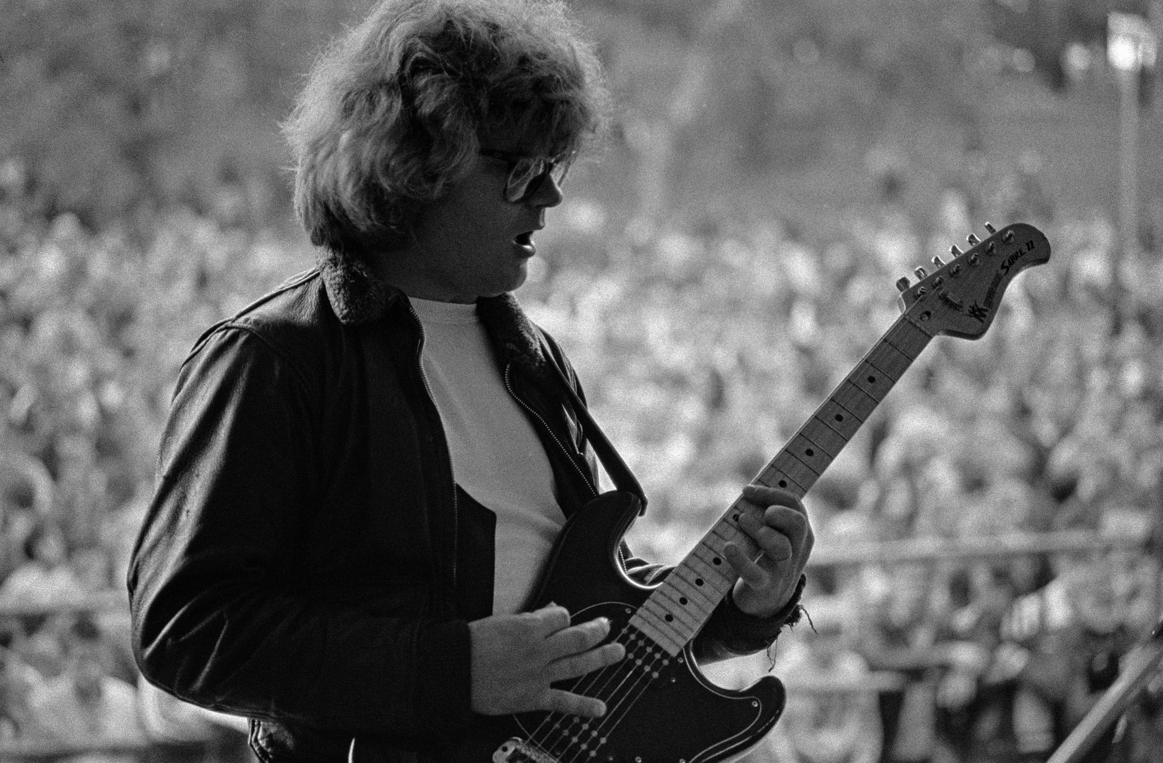 Hurriganes esiintyy Kaivopuistossa. Albert Järvinen (kitara).